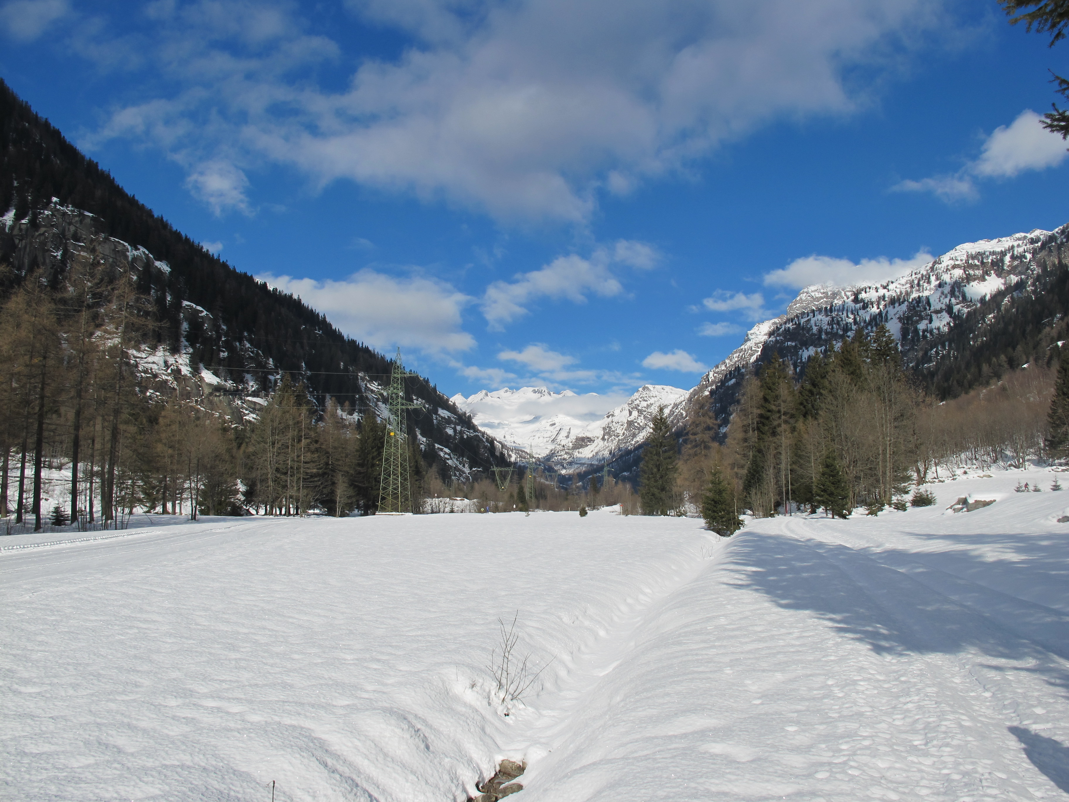 Vista dei monti della Val Formazza.